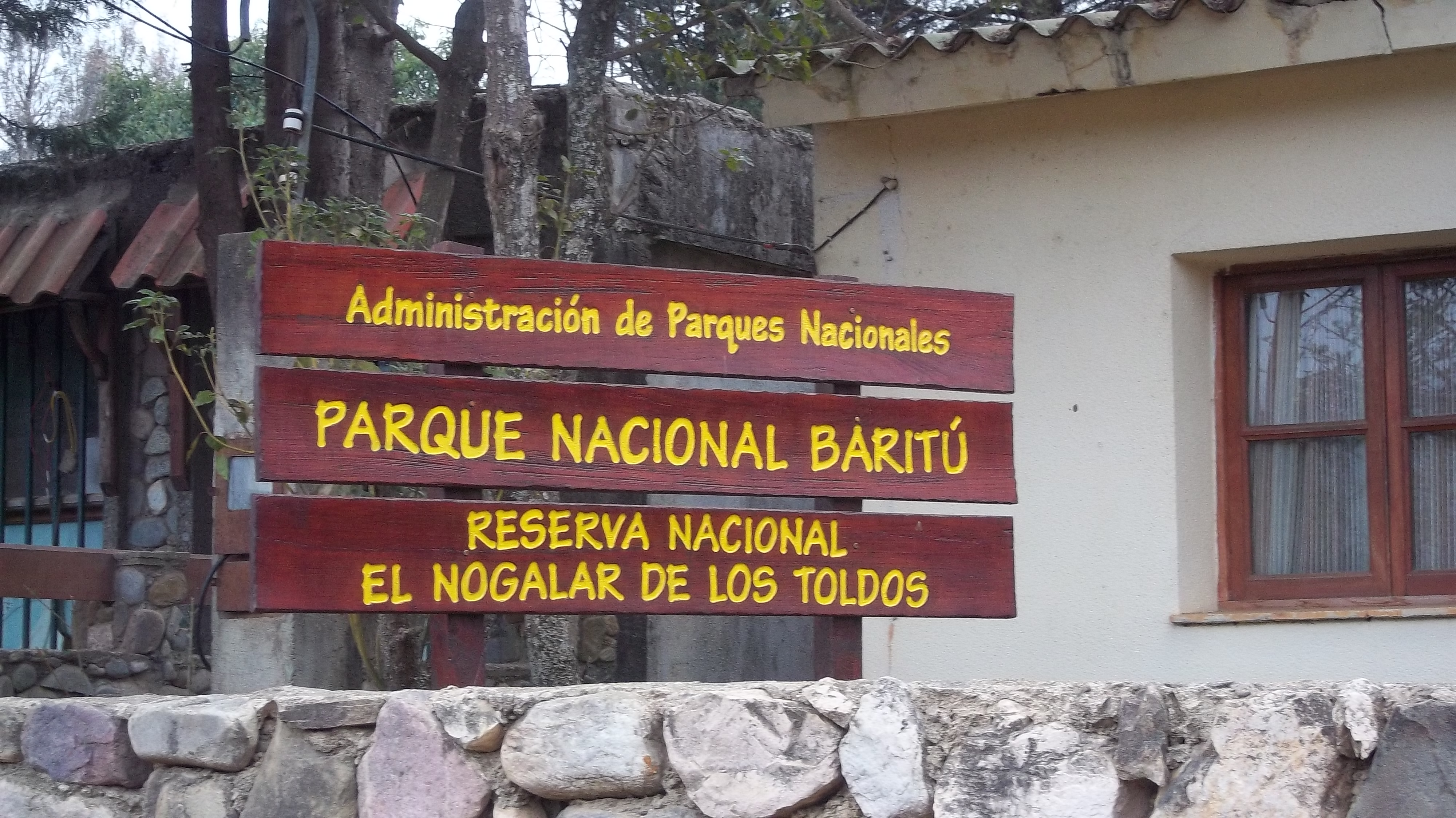 Administracion de Parques Nacionales - Los Toldos - Santa Victoria